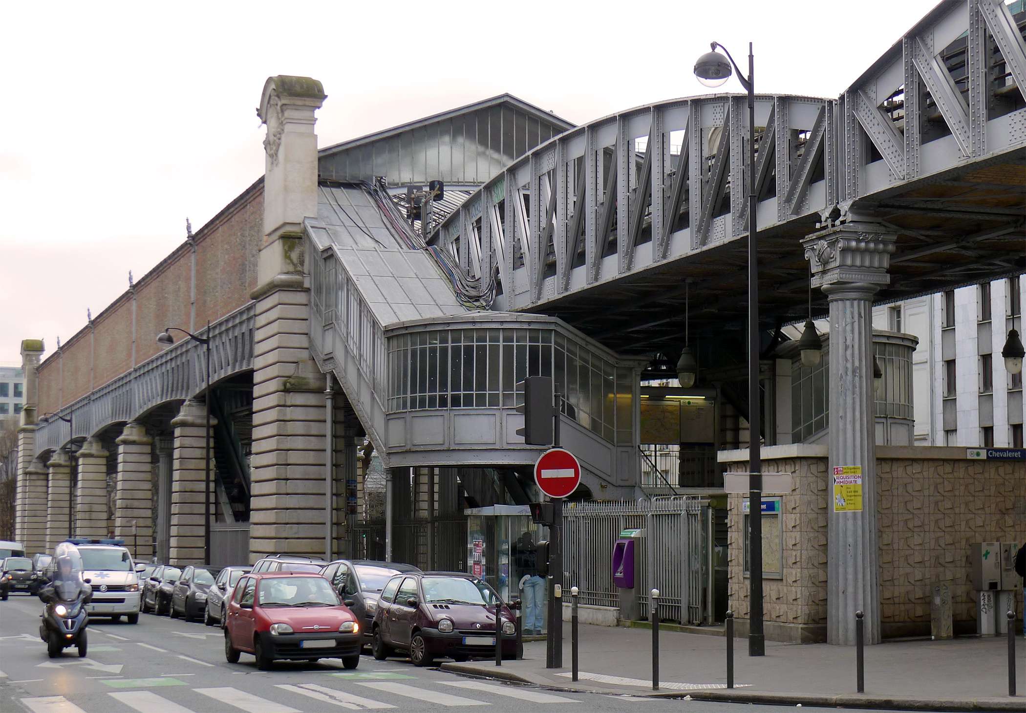 Station de métro "Chevaleret" de la ligne n°6 - Paris XIII